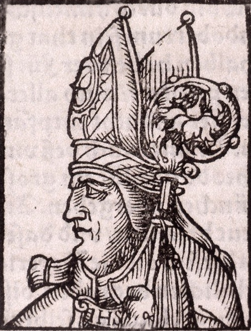 S. Florentius Bischoff zu Strassburg. Bibliothèque nationale et universitaire de Strasbourg